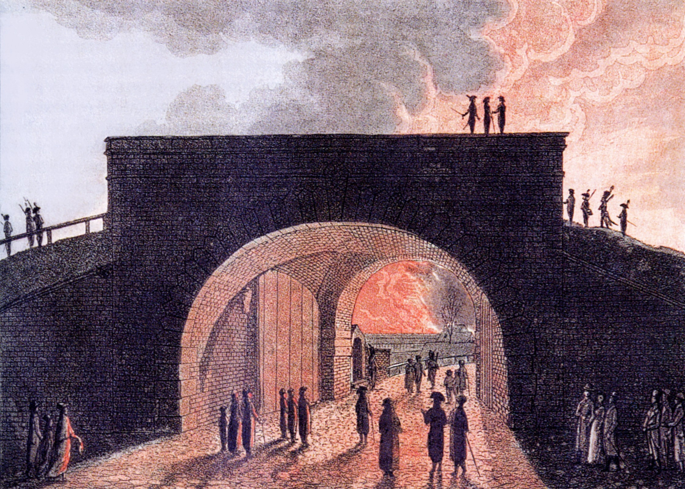 "Alt-Breslau". Das Odertor in Breslau 1806. Niederbrennen der Oder-Vorstadt vor Beginn der Belagerung, am 18. November 1806.